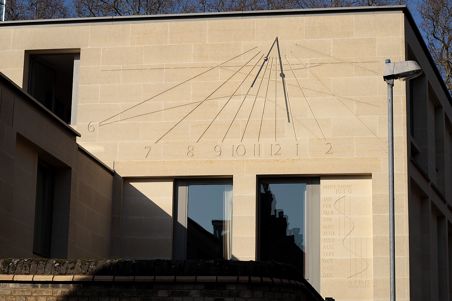 POTD 12/2/2008